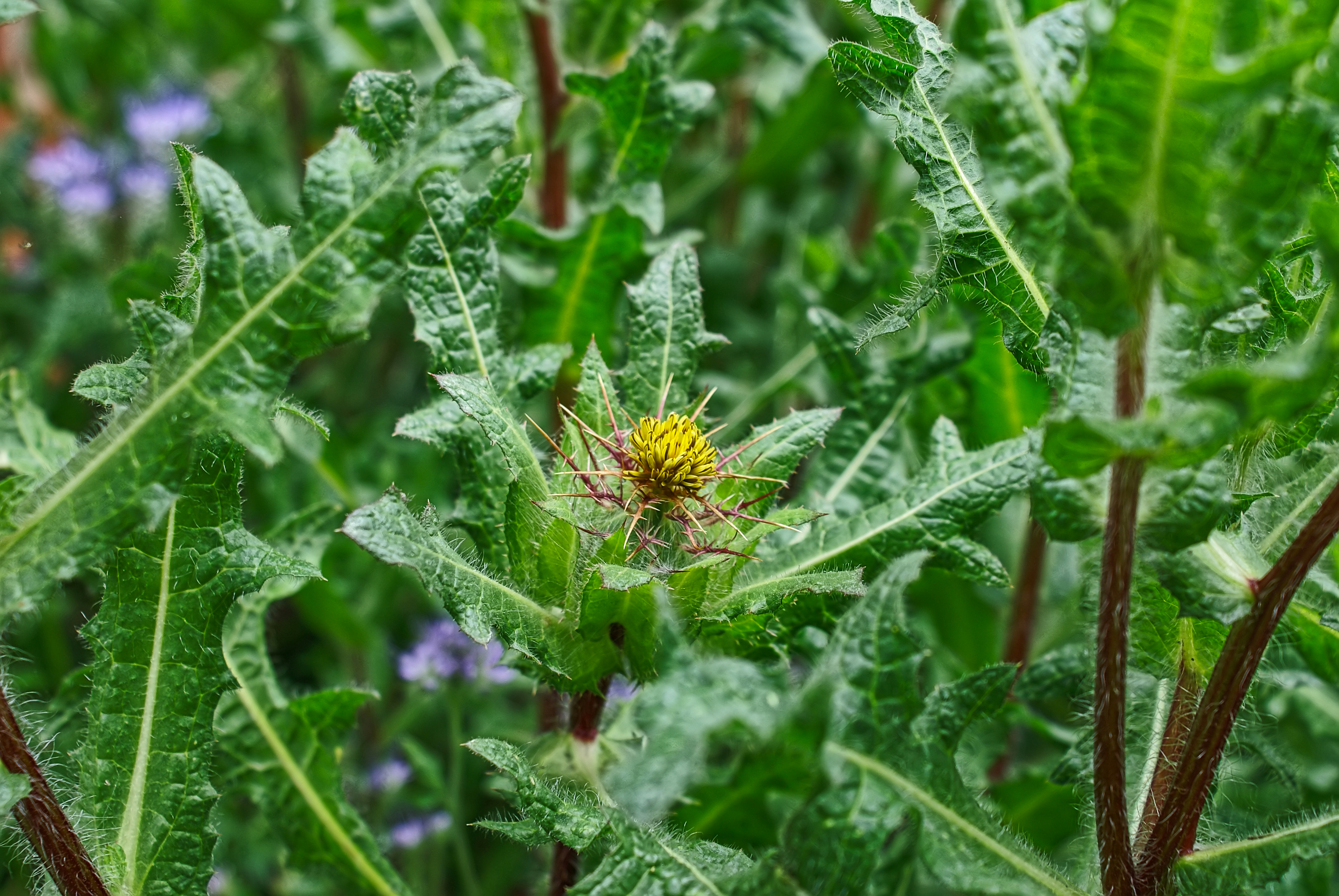 kwitnący drapacz lekarski